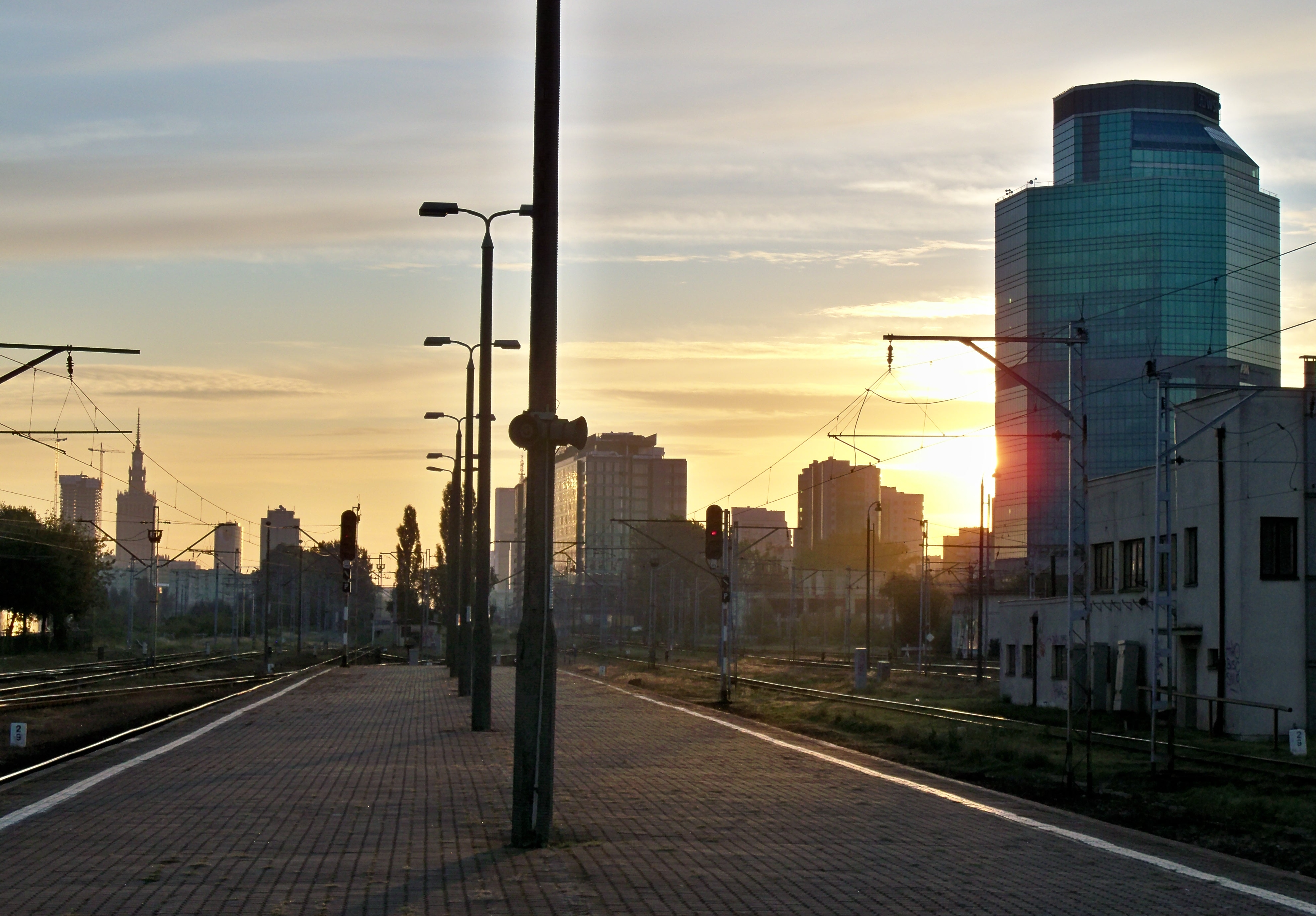 Dworzec kolejowy Warszawa Zachodnia, widok na budynki Ochoty i Śródmieścia. Blisko po prawej wieżowiec Eurocentrum Alpha, na wprost Brama Zachodnia, w głębi Pałac Kultury i Nauki oraz Żagiel Libeskinda.